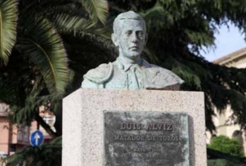 Busto de Luís Alviz situado enfrente de la plaza de toros de Cáceres